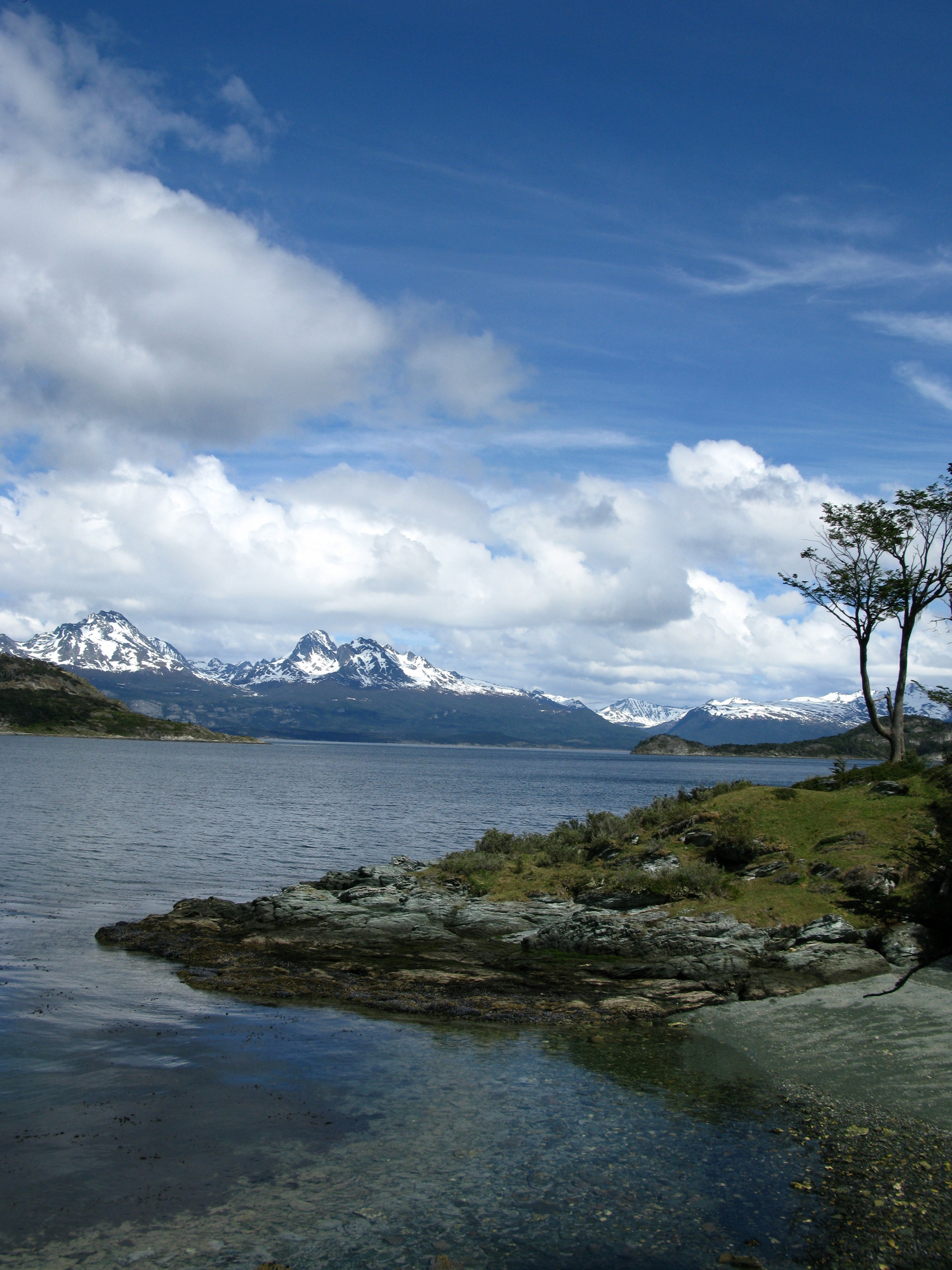 Côté canal de Beagle